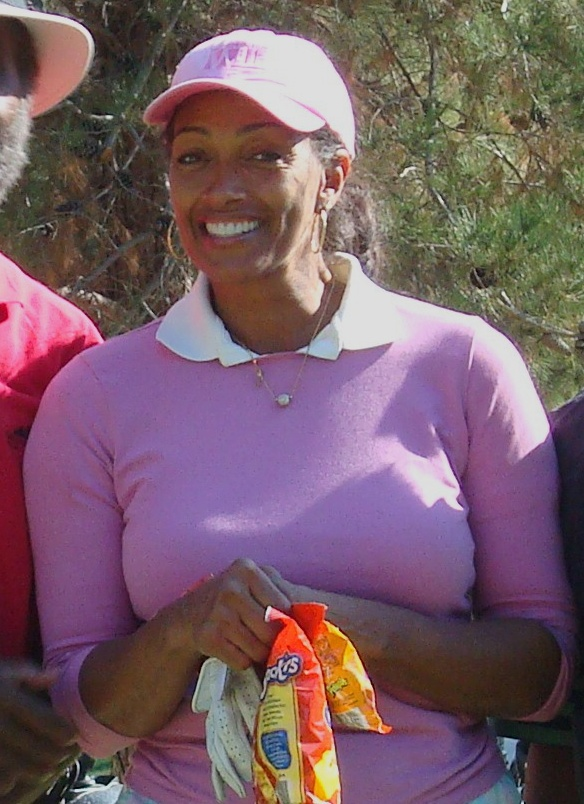 Barker's Beauty Kathleen Bradley